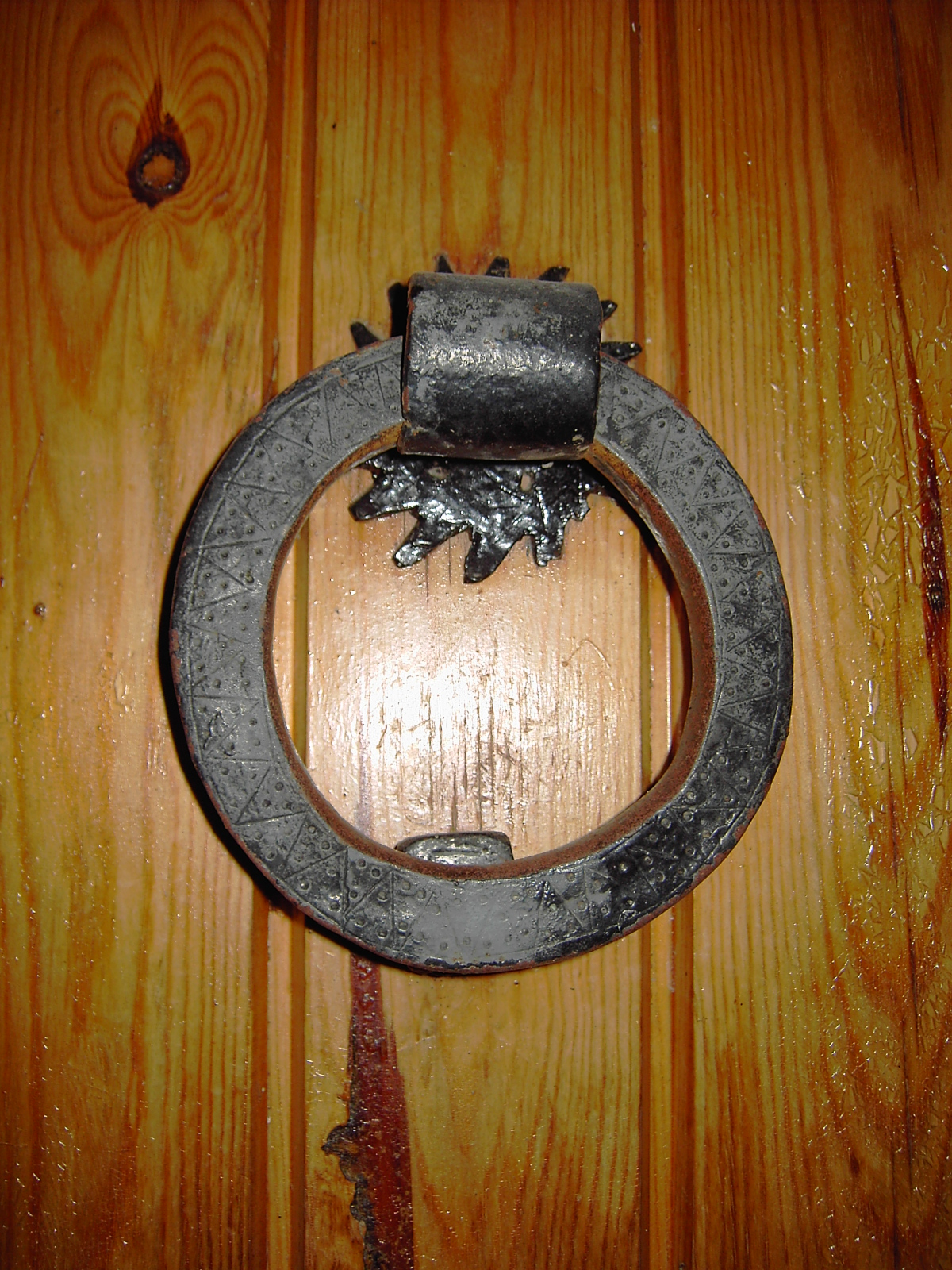 Una aldaba de puerta.